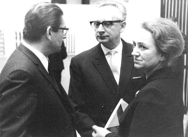 Dortmund, Fritz Kühn, Dietrich Keuning, Frau Kühn Zentralbild ZB schw 18.2.1966 Eröffnung der Ausstellung "Gestalteter Stahl" in Dortmund. Prof. Fritz Kühn (DDR) (links), Oberbürgermeister der Stadt Dortmund, [Dietrich] Keuning (Bildmitte) und Frau Kühn (rechts) bei der Eröffnung der Ausstellung am 28.1.1966. Prof. Kühn zeigte in dieser Ausstellung 139 Werke, z.T. Werkstücke in Stahl, Kupfer sowie Beton und Stahl. Die feierliche Eröffnungsveranstaltung wurde von mehreren hundert Personen besucht, die sich für die Arbeiten eines Künstlers aus der DDR interessierten. Abgebildete Personen: Kühn, Fritz Prof.: Kunstschmied, Fotograf, DDR Keuning, Dietrich: Oberbürgermeister von Dortmund, Bundesrepublik Deutschland